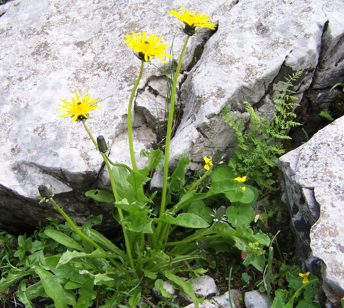 Taraxacum alpinum (pl. mniszek alpejski), habitat: West Tatra Mountains, Kobylarzowy Żleb)